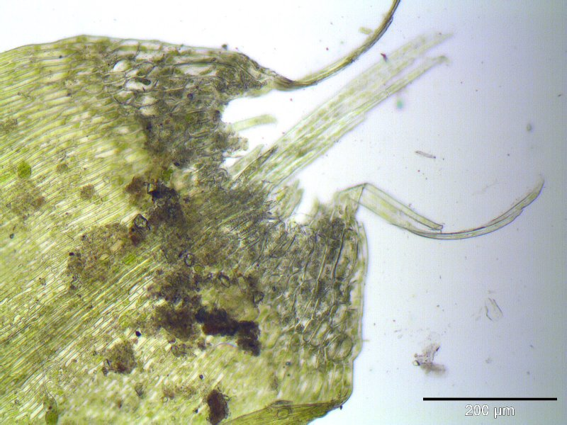 Drepanocladus polycarpus, Blattflügelzellen, Vergrößerung: 125x